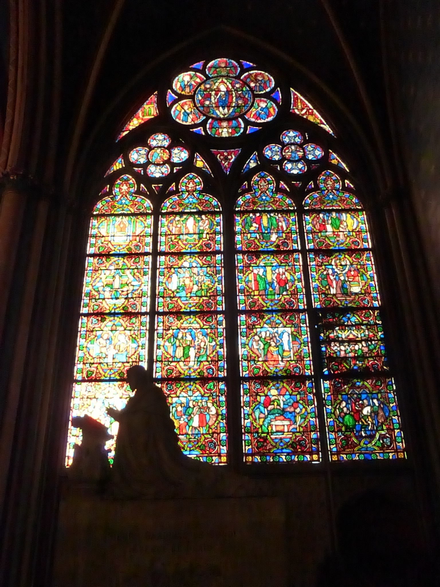 Paris, Notre-Dame - Chapelle de Notre-Dame-des-Sept-Douleurs, aube sur monseigneur Pierre de Gondi